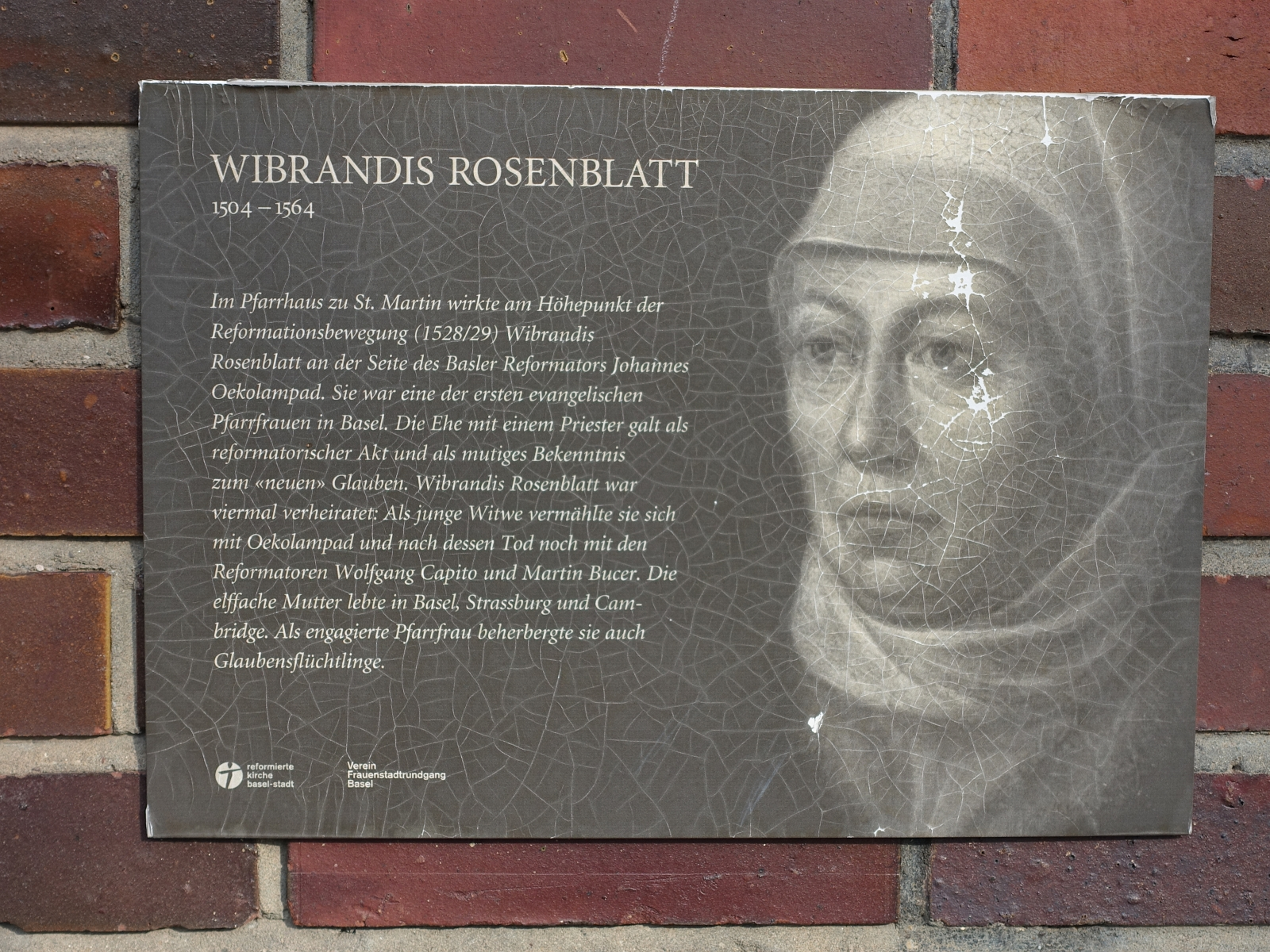 Gedenktafel für Wibrandis Rosenblatt (1504–1564). Gemeindehaus Oekolampad, Allschwilerplatz, Basel. 1528 heirateten Johannes Oekolampad und Wibrandis Rosenblatt. Der Ehe entstammten drei Kinder. Nach einer fünfmonatigen Witwenzeit kam es zur Heirat mit dem 26 Jahre älteren Witwer Wolfgang Capito (1478−1541). Nach dessen Tod heirateten Wibrandis Rosenblatt und Martin Bucer im Jahr 1542.